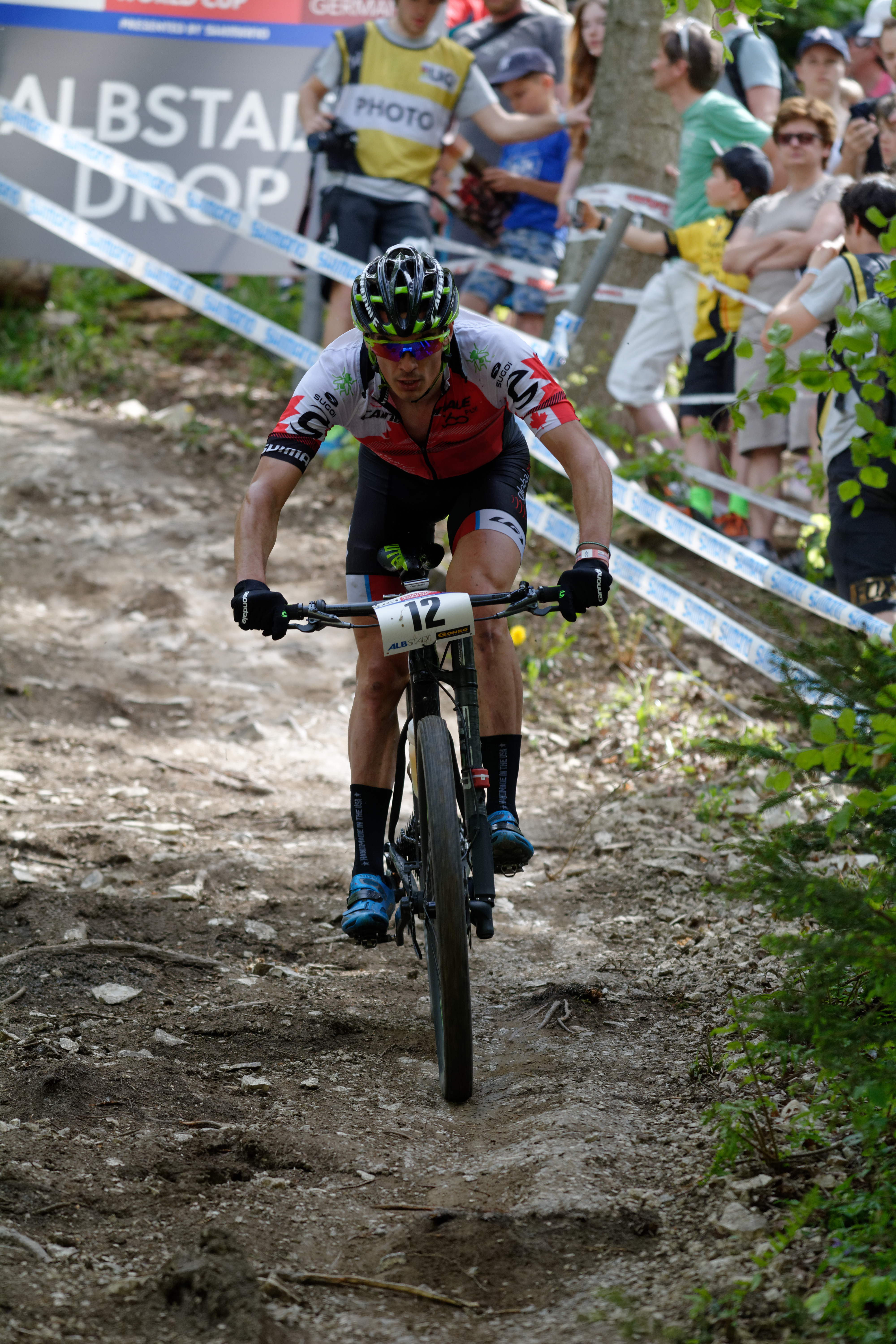 D71_7129_DxO